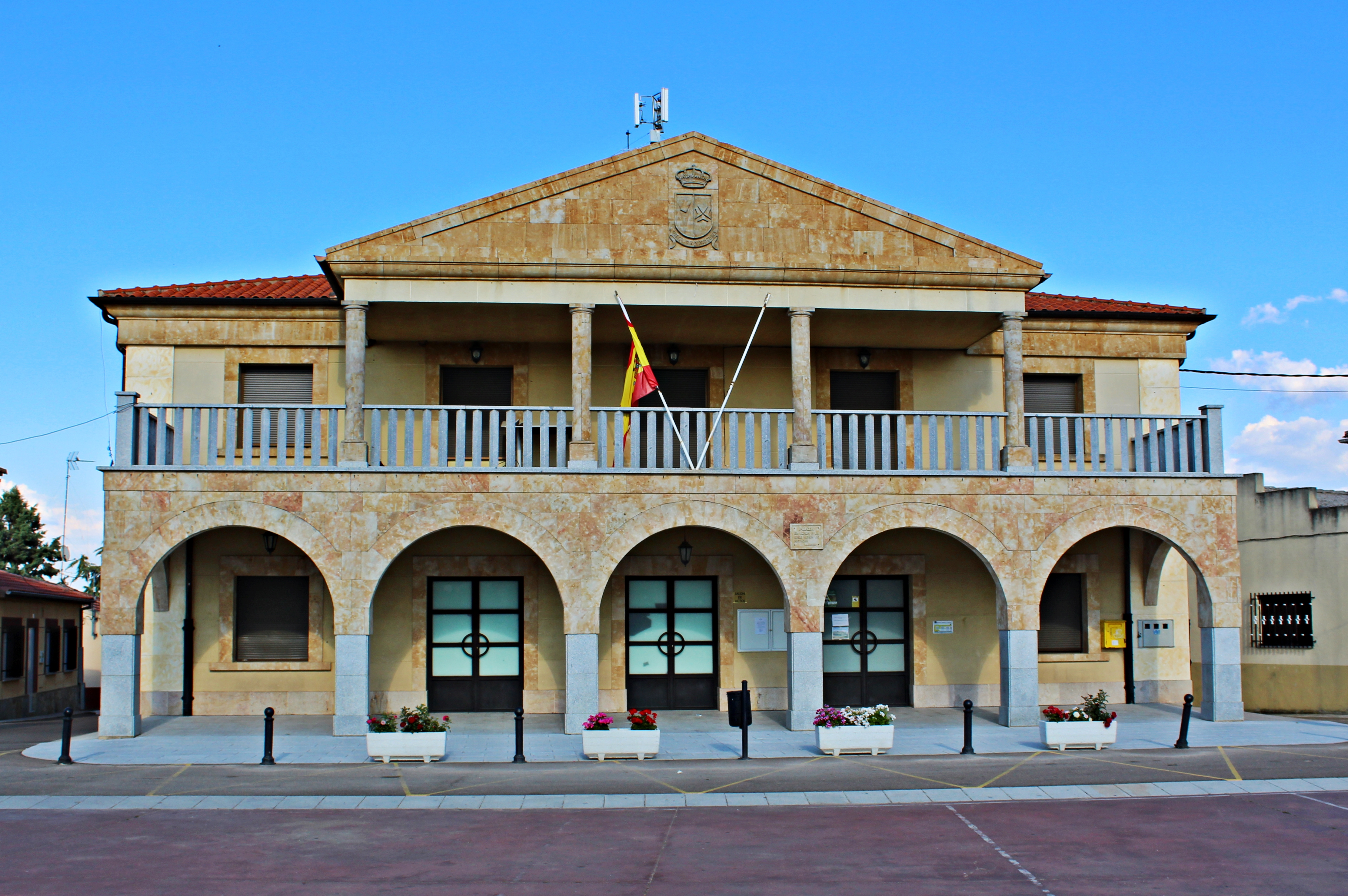 Ayuntamiento de Valdelosa, provincia de Salamanca